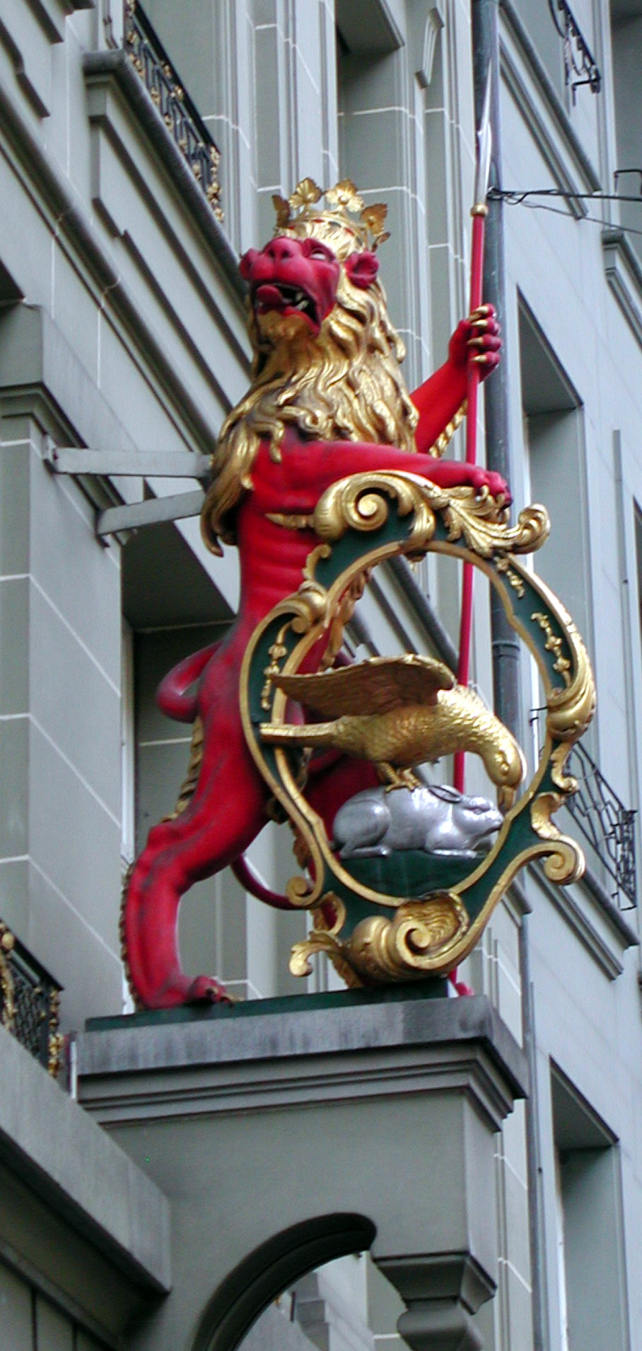 Der rote Löwe das Wappentier der Berner Gesellschaft zu Mittellöwen an der Marktgasse zu Bern.